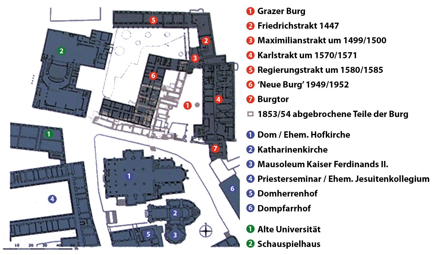 Infoboard an Grazer Burg